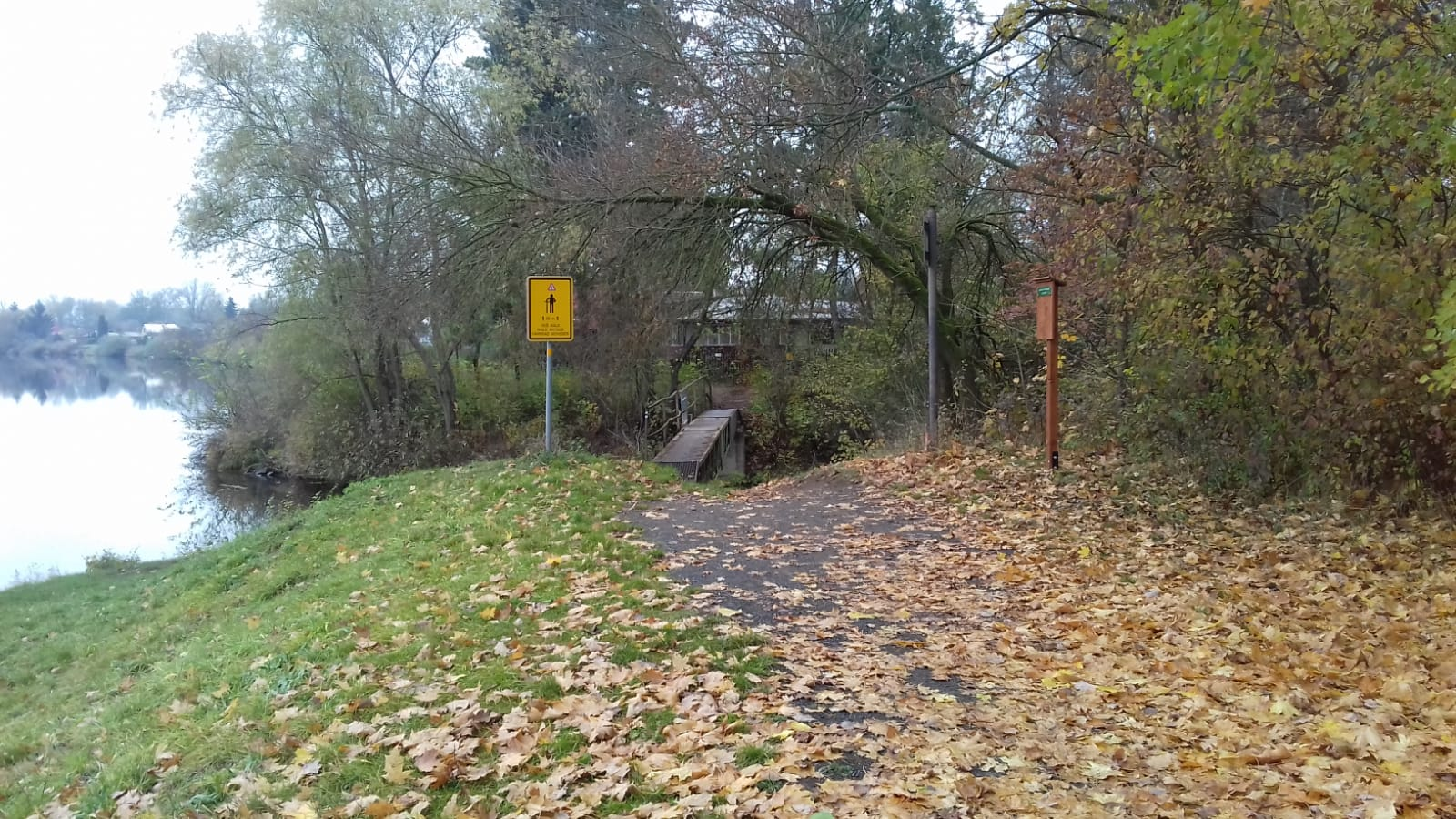 Západní začátek trasy. Za žlutou cedulí, která říká "cyklisto sesedni z kola" vede můstek pryč z území